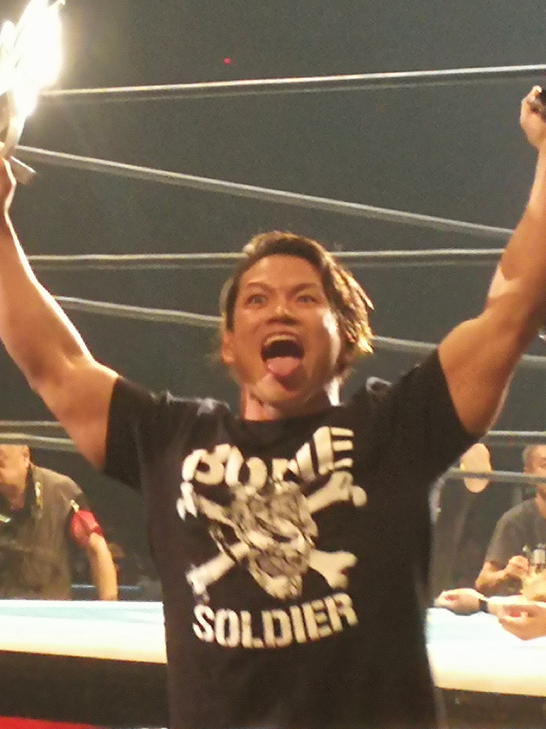 2019年11月3日 大阪・大阪府立体育会館（エディオンアリーナ大阪）石森太二選手